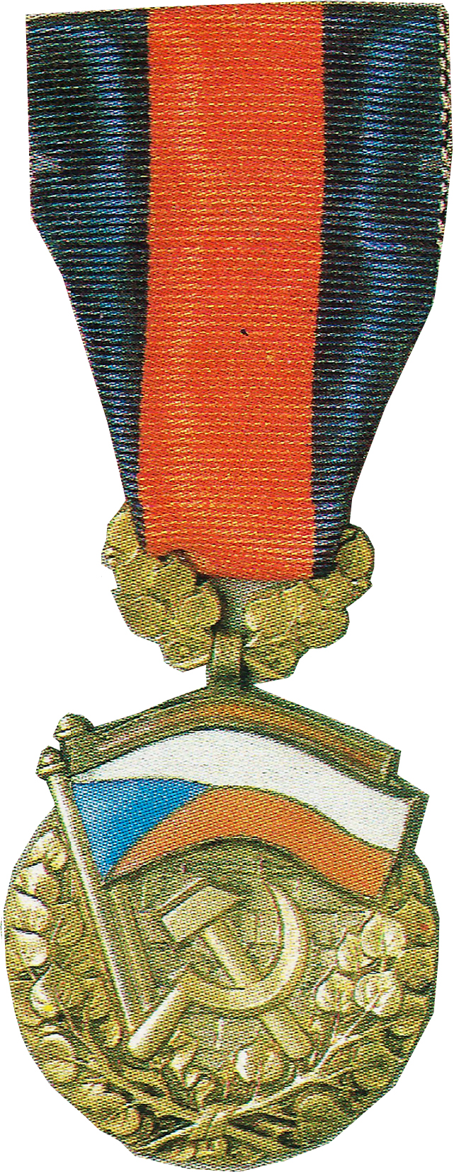 Rad republiky ČSSR